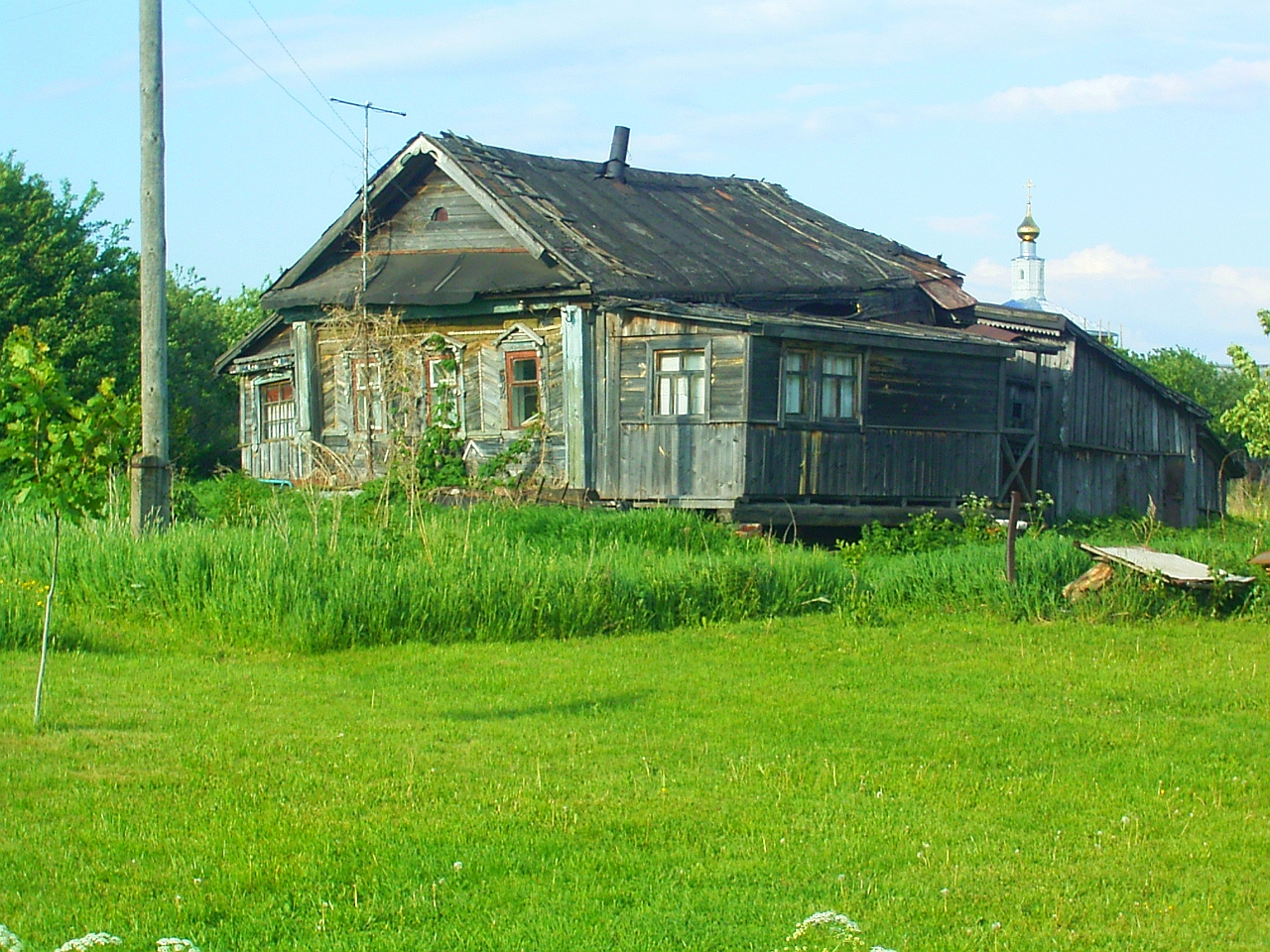 золотойКУПОЛ